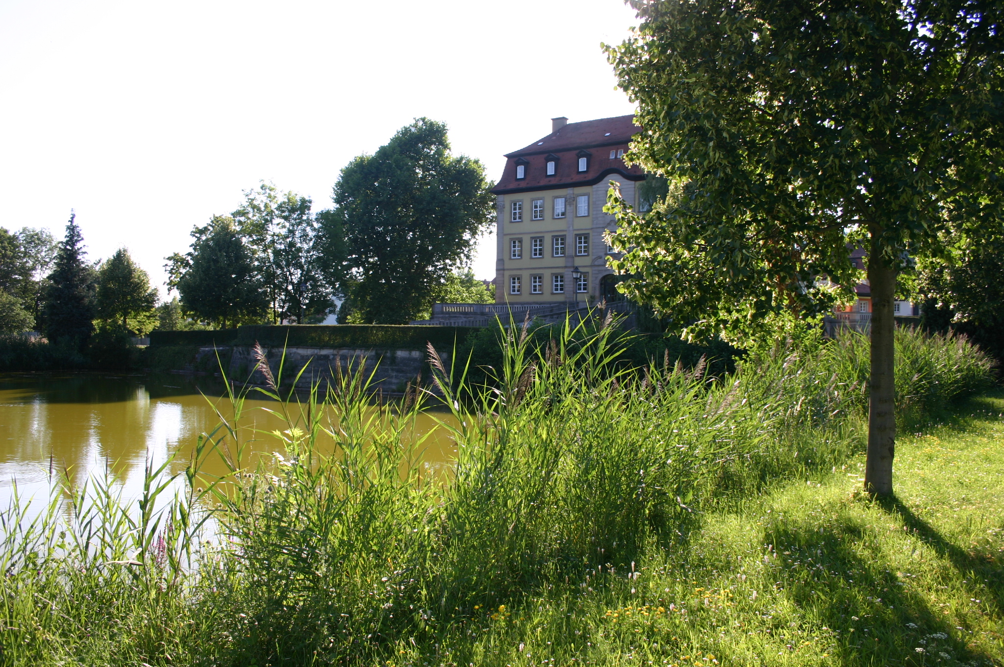 Ostansicht Schloß Gleisenau Teich